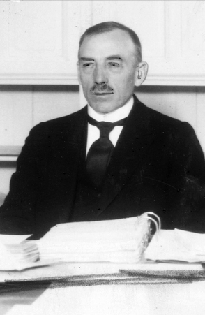 portrett, mann, byskriver i Oslo, sittende halvfigur ved skrivebord.